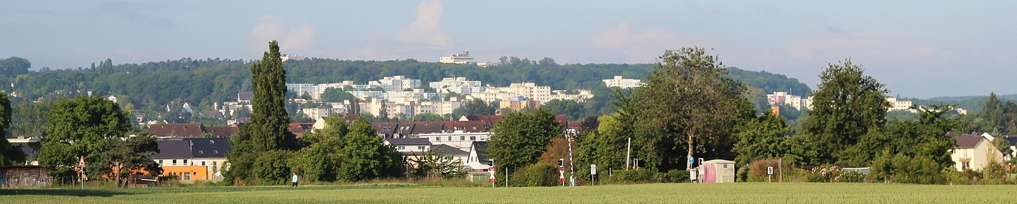 Blick vom Messdorfer Feld auf den Stadtteil Bonn-Medinghoven am Hang des Hardtbergs